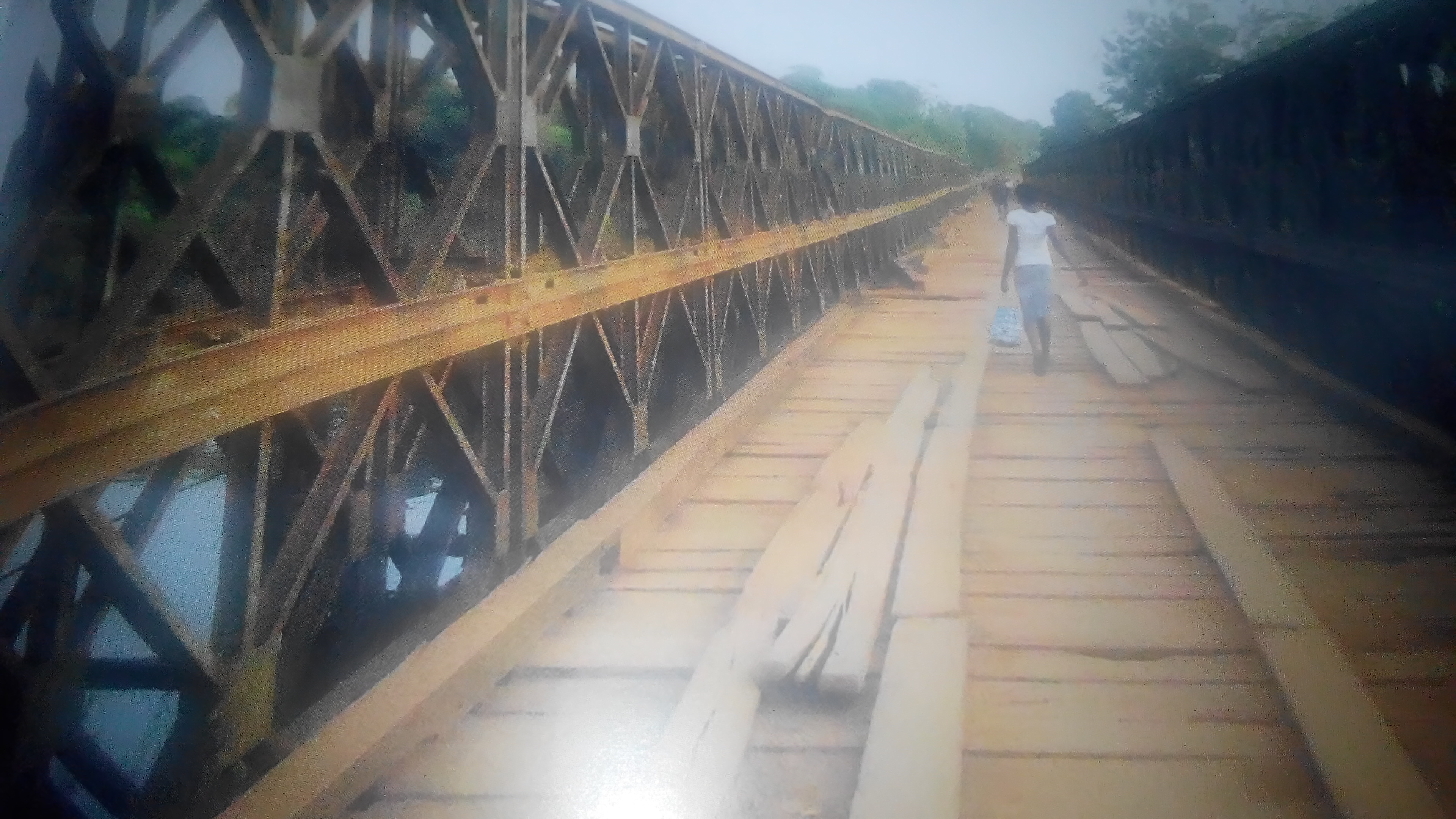 Pont jeté sur la rivière Rubi. L'un des ponts célèbre du Bas-Uele, témoignant le sous développement et le manque de modernisation de la contrée